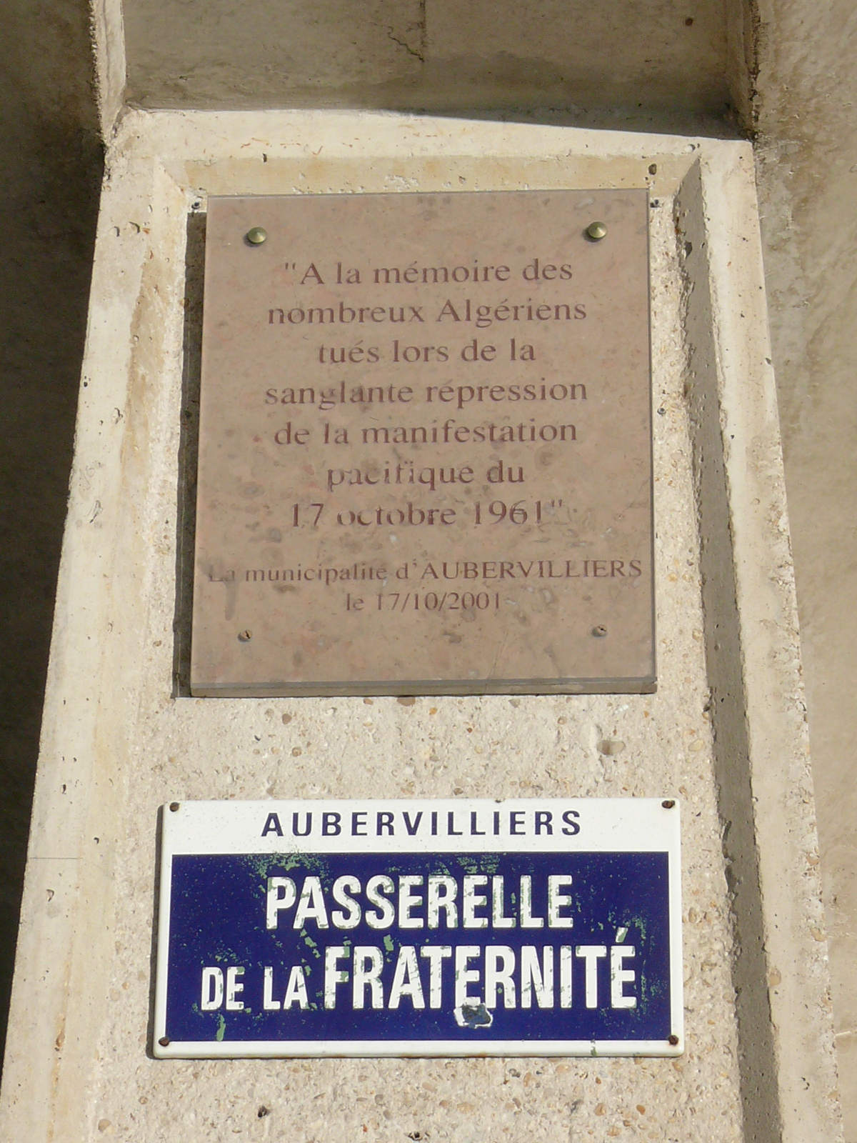 Plaque commémorative du massacre des algériens lors de la manifestation du 17 octobre 1961 sous les ordres du Préfet de Police Maurice Papon, implantée sur la Passerelle de la Fraternité à Aubervilliers